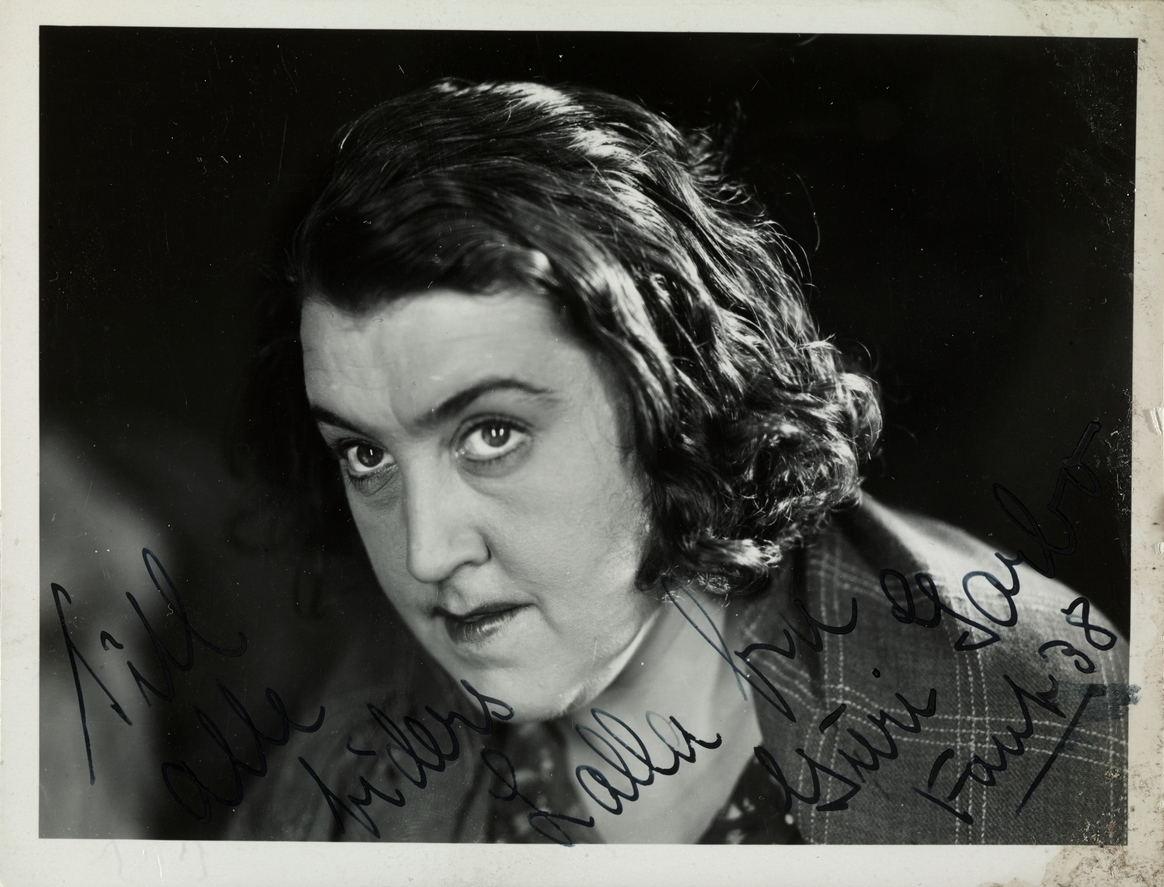 Skuespiller Guri Stormoen i et rollebilde fra filmen "Fant" (1937).